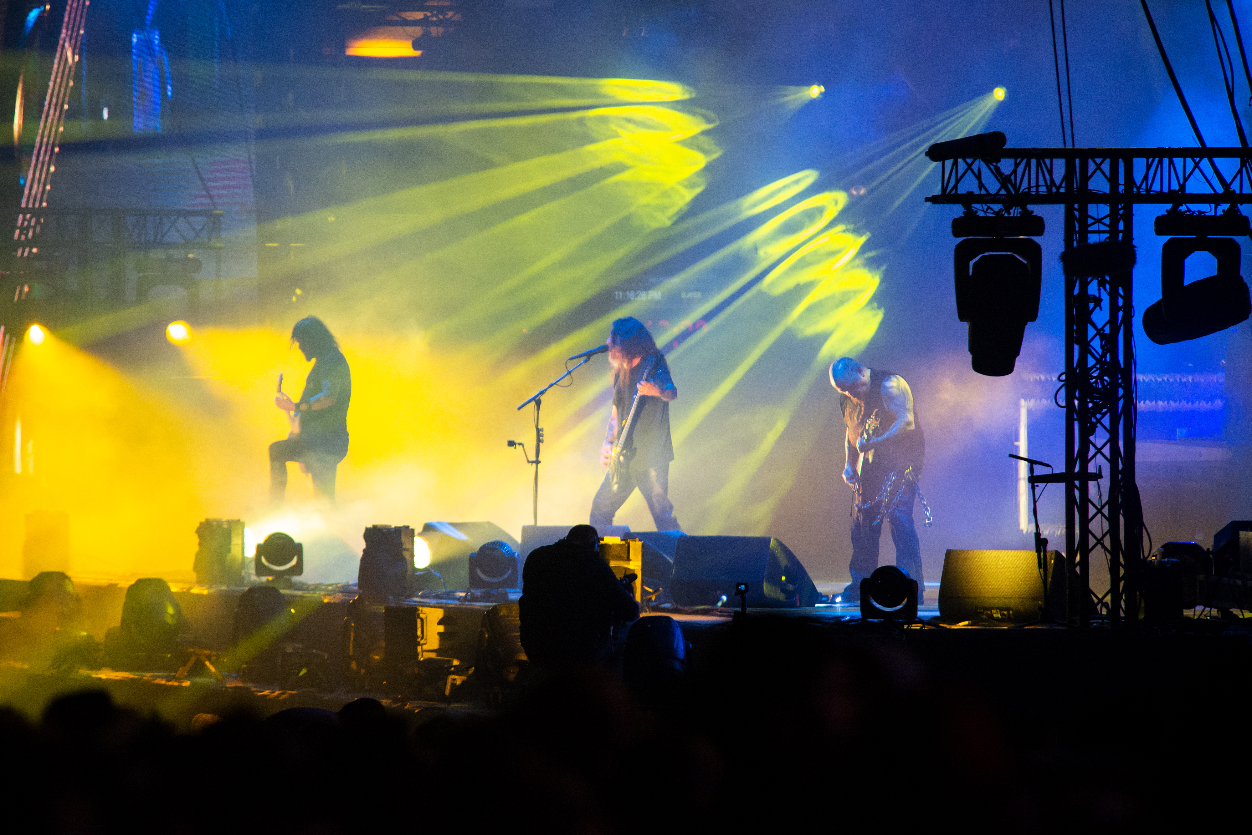 Concert du groupe américain Slayer au Hellfest 2019.